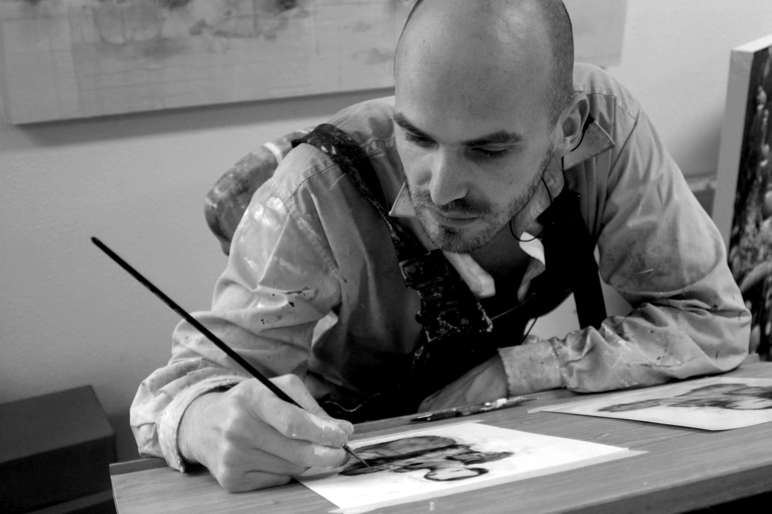 Chris Berens (Oss, 1976) is een Nederlands kunstschilder en illustrator. Hij is afgestudeerd aan de Akademie voor Kunst en Vormgeving St. Joost in 's-Hertogenbosch in 1999. Hij woont en werkt in Amsterdam.